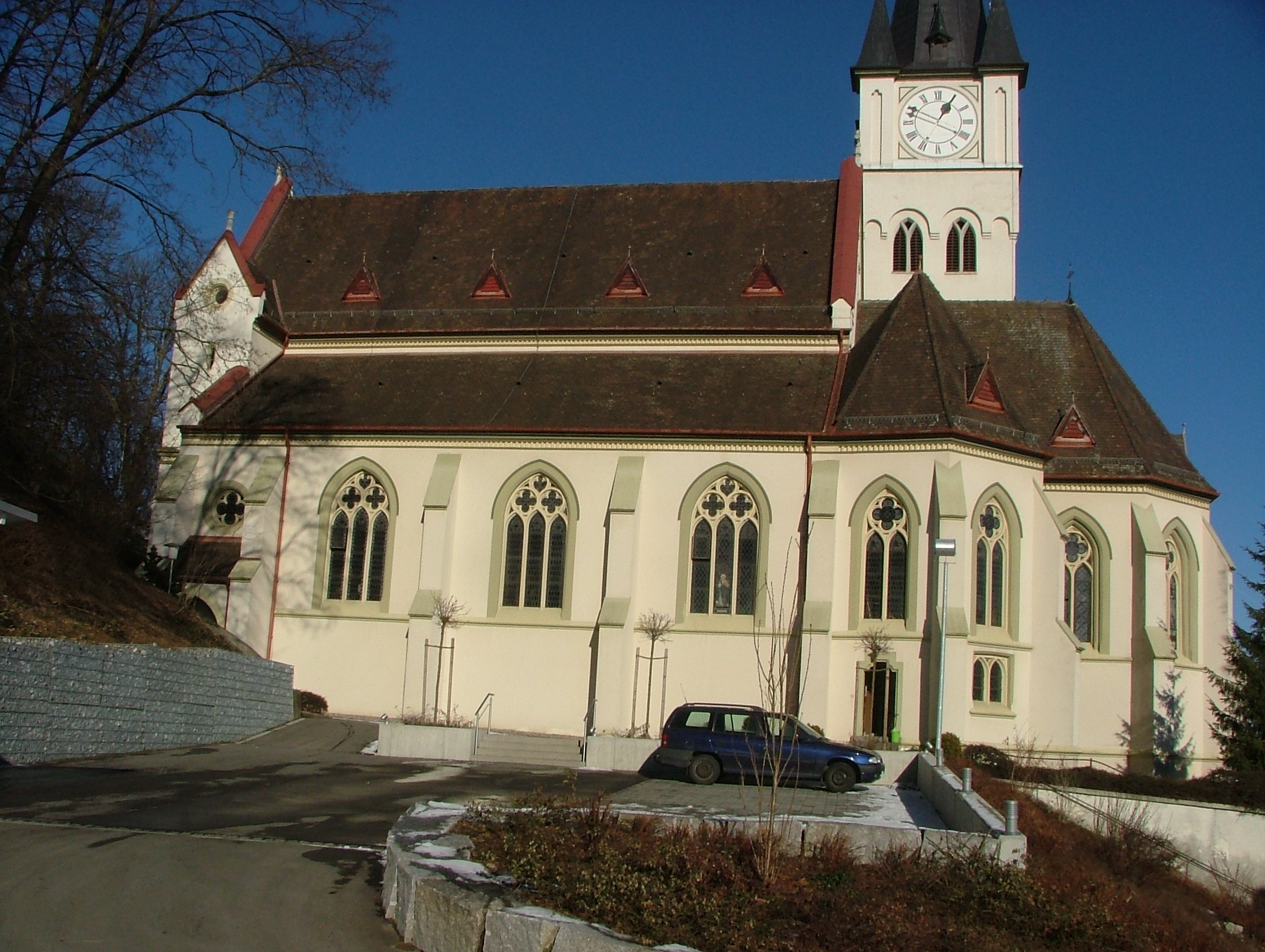 Erolzheim, Kath. Pfarrkirche